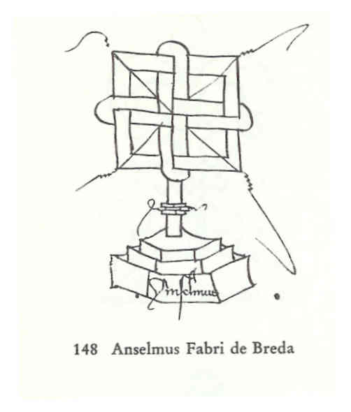 notaristeken Anselmus Fabri